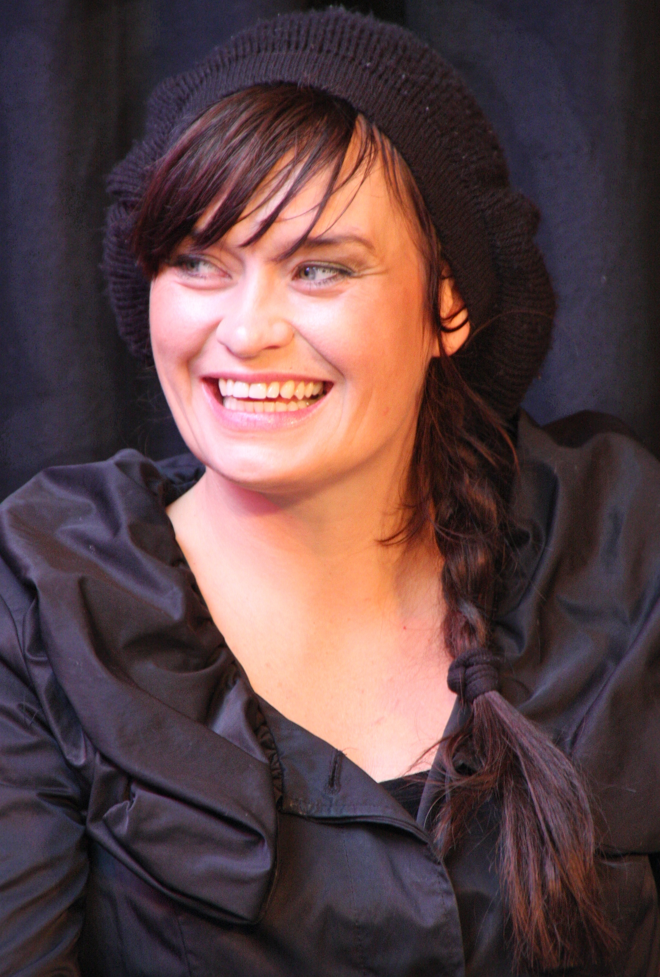 Selma Lønning Aarø